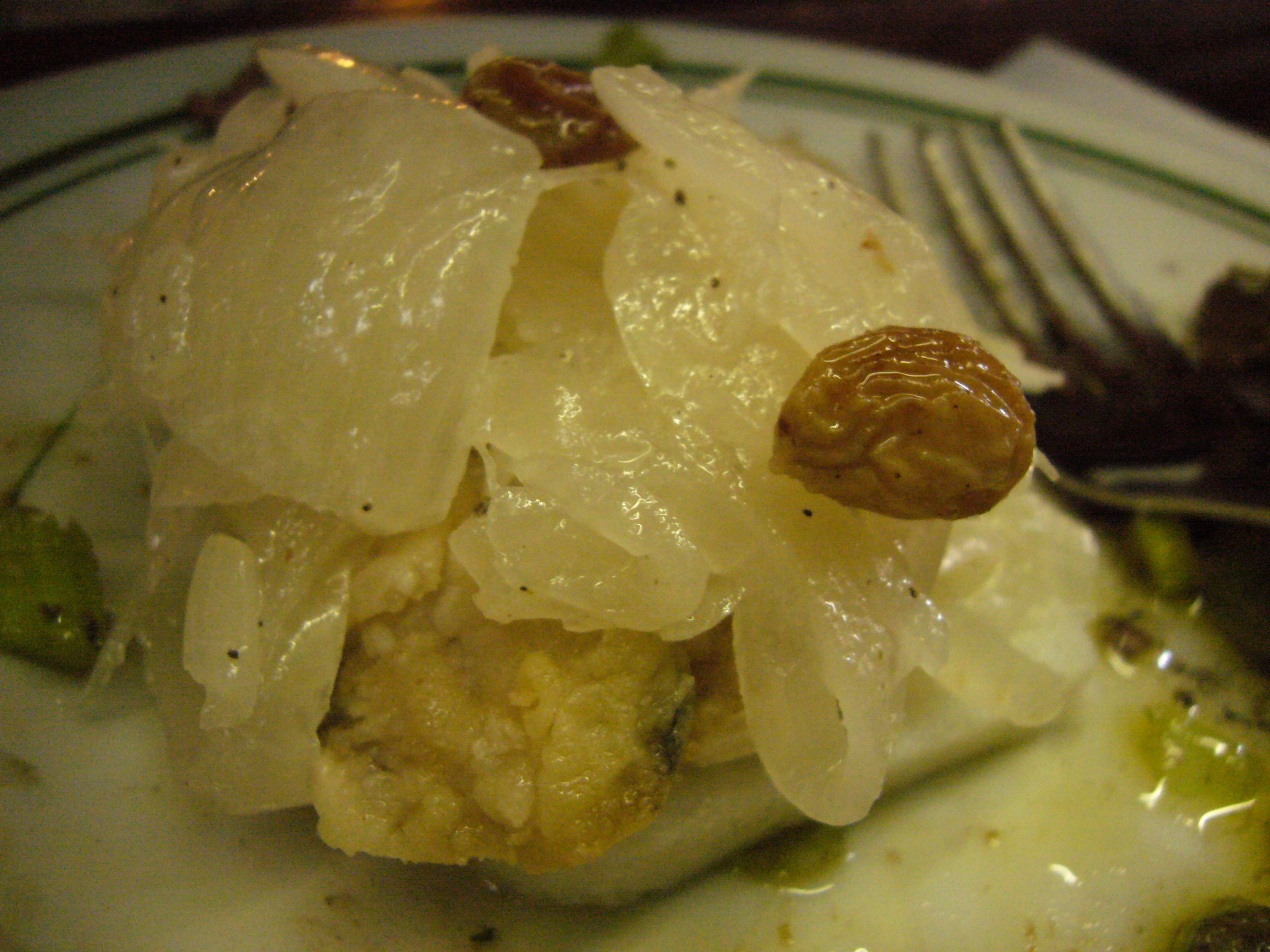 sarde in saòr